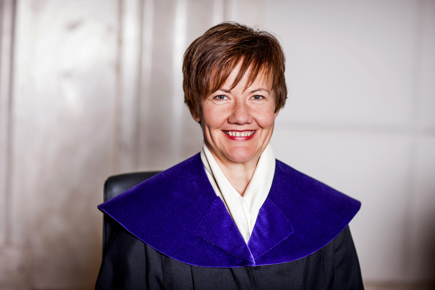 Dr. Ingrid Siess-Scherz, Mitglied des österreichischen Verfassungsgerichtshofs seit 2012.